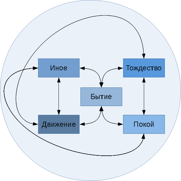 Схема взаимодействия «пяти высших родов»